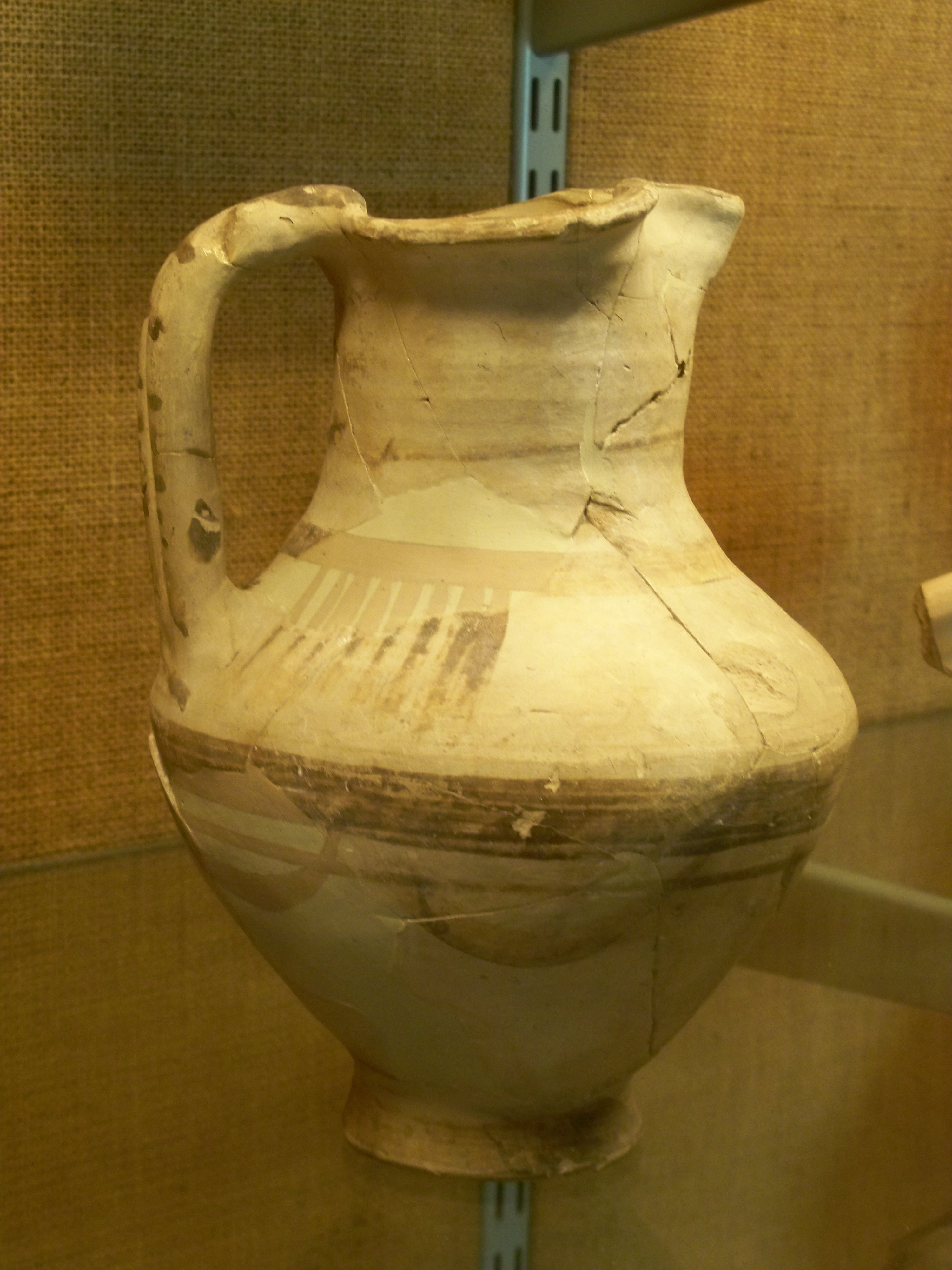 oenoché au musée du Pègue, Drôme, France